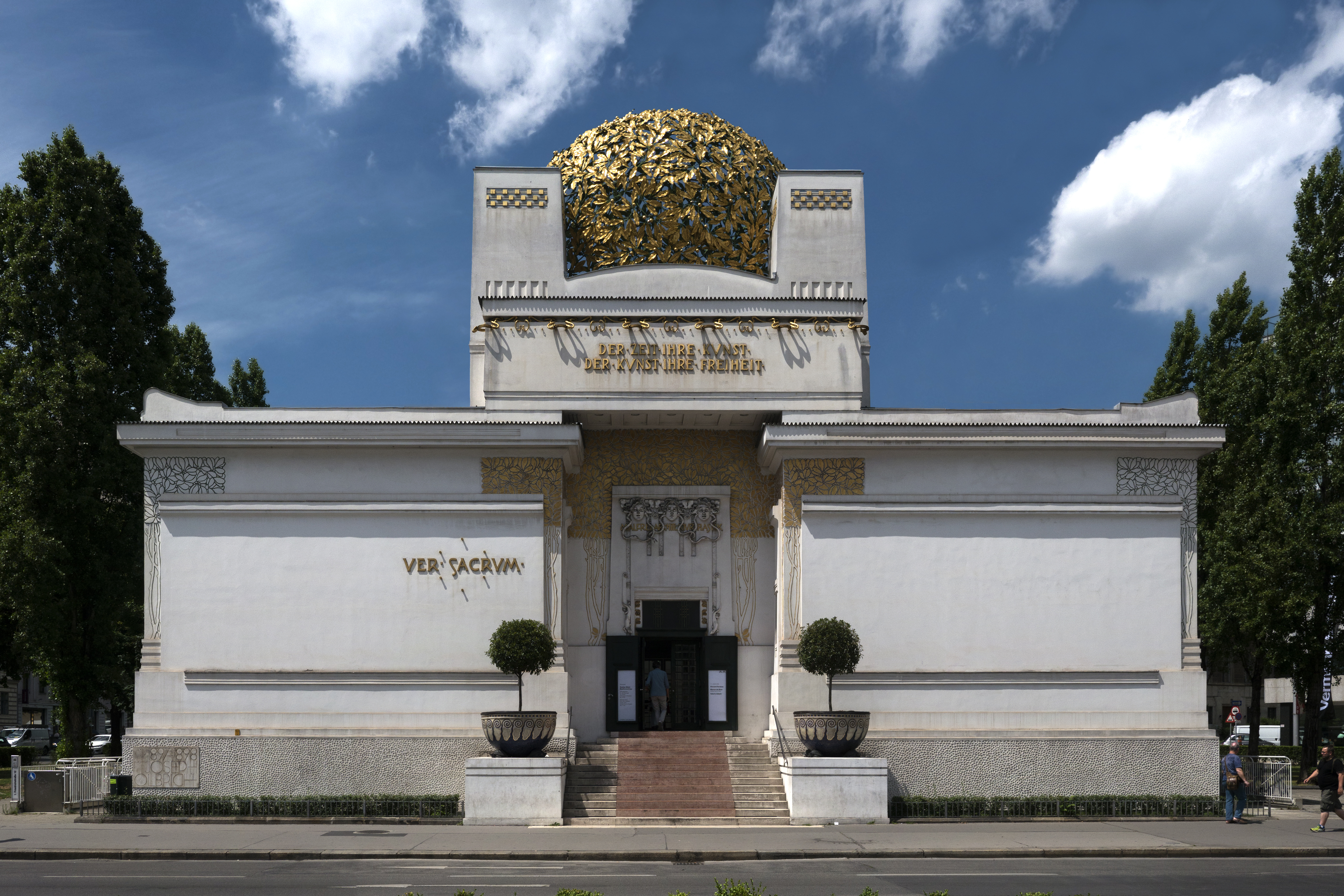 Secession 2016, Vienna